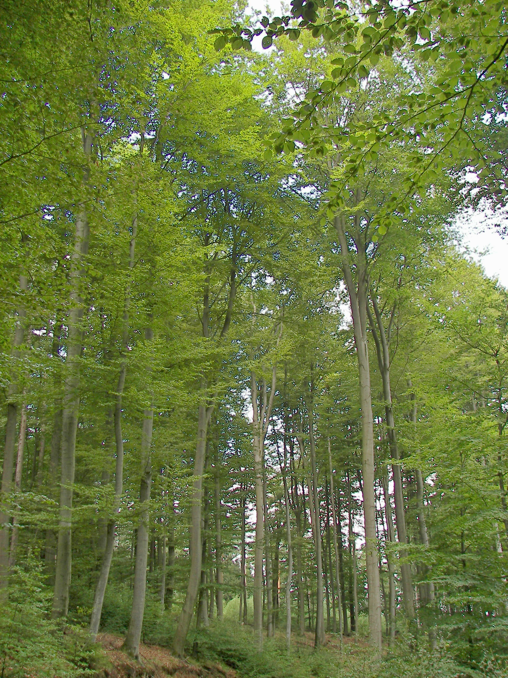 Buchenwald im Burgwald (Buntsandstein), Hessen, am 30.07.2006